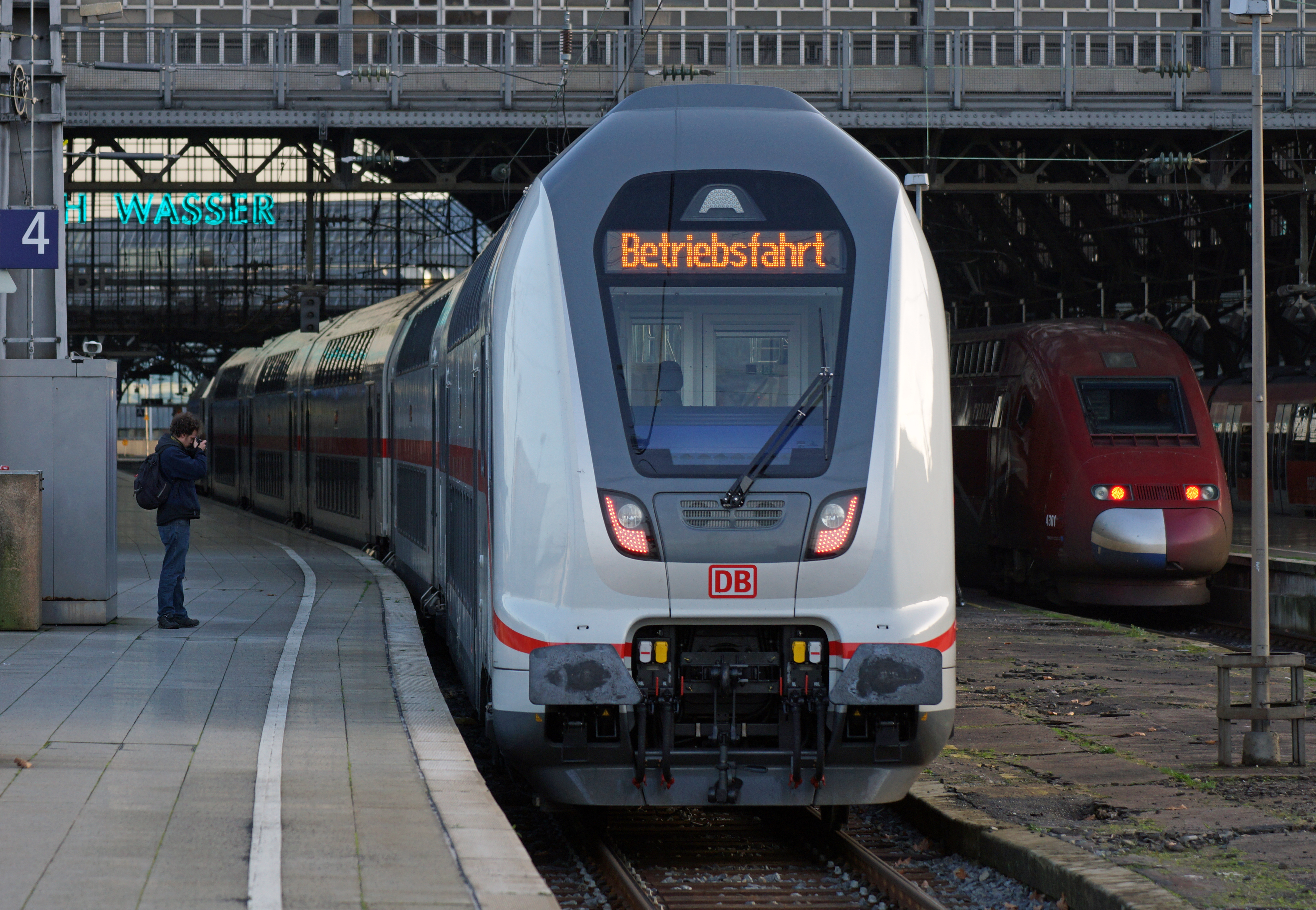 Bombadier Twindexx (IC 2) im Kölner Hauptbahnhof